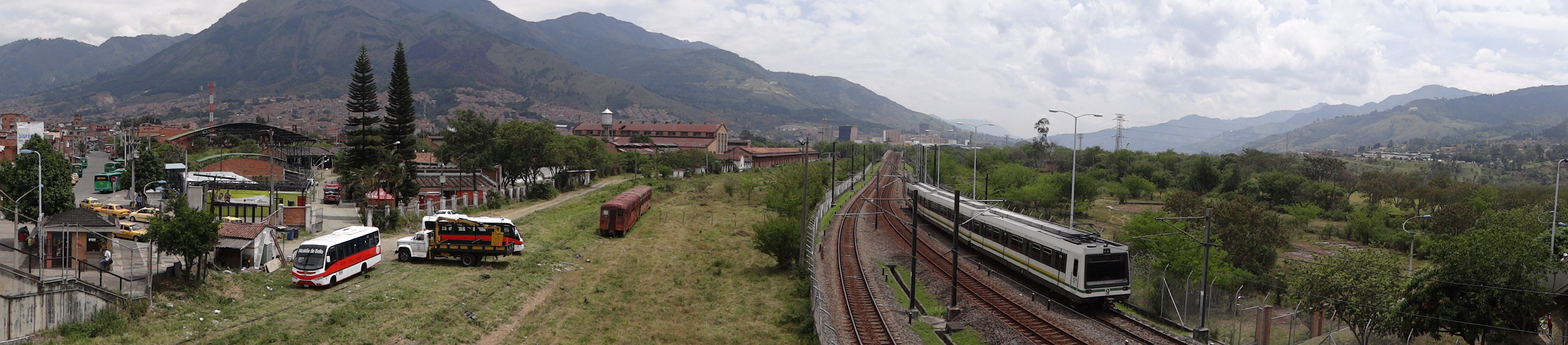 Estación del Ferrocarril Bello